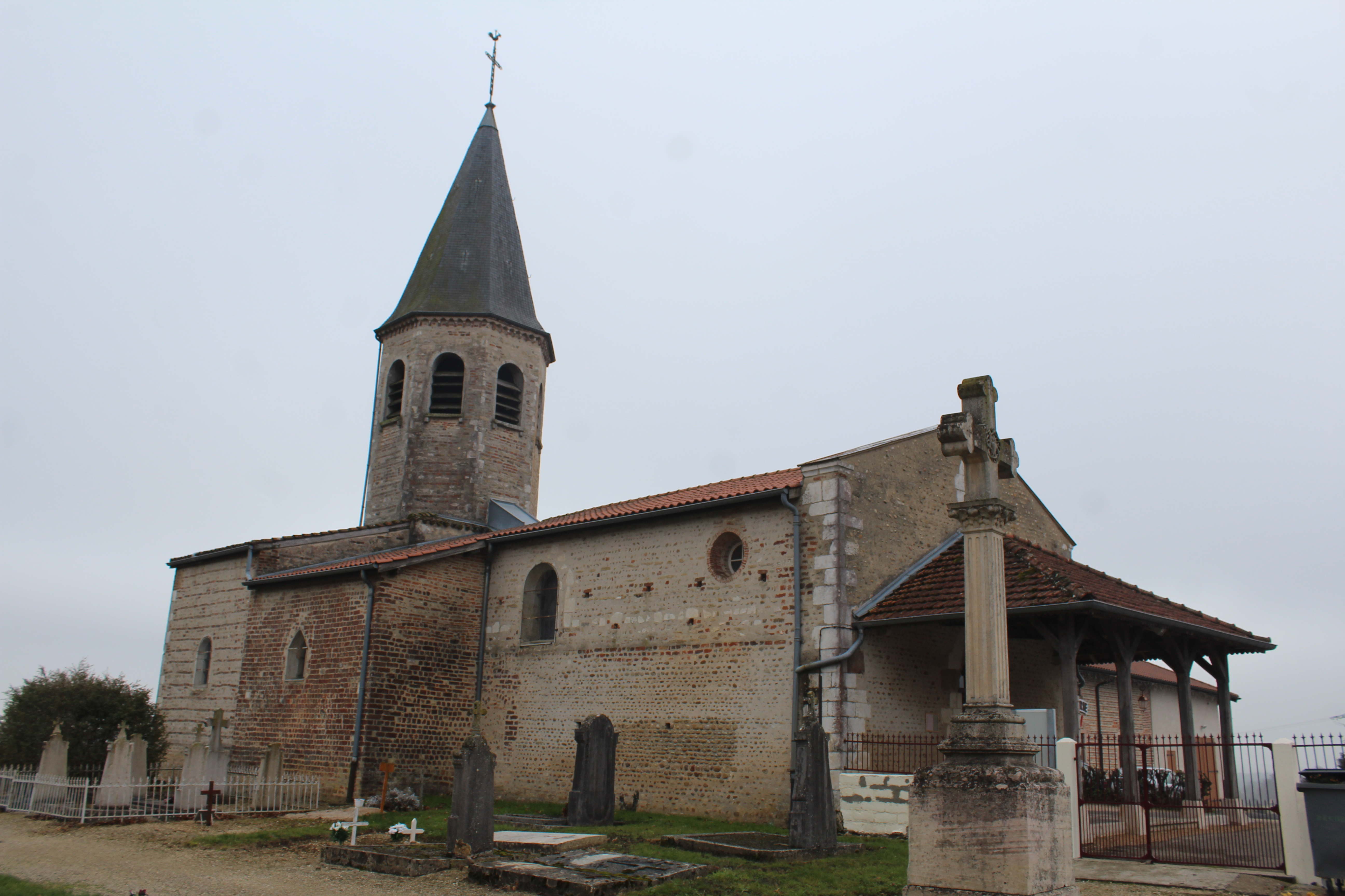 Église Saint-Martin de Chanoz-Châtenay.